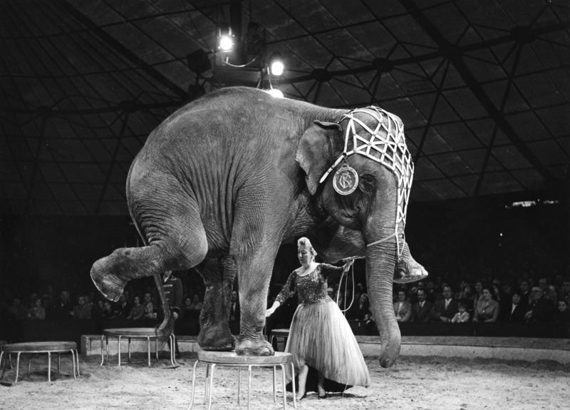 Zirkus Krone Elefantendressur Frieda Krone - Senbach